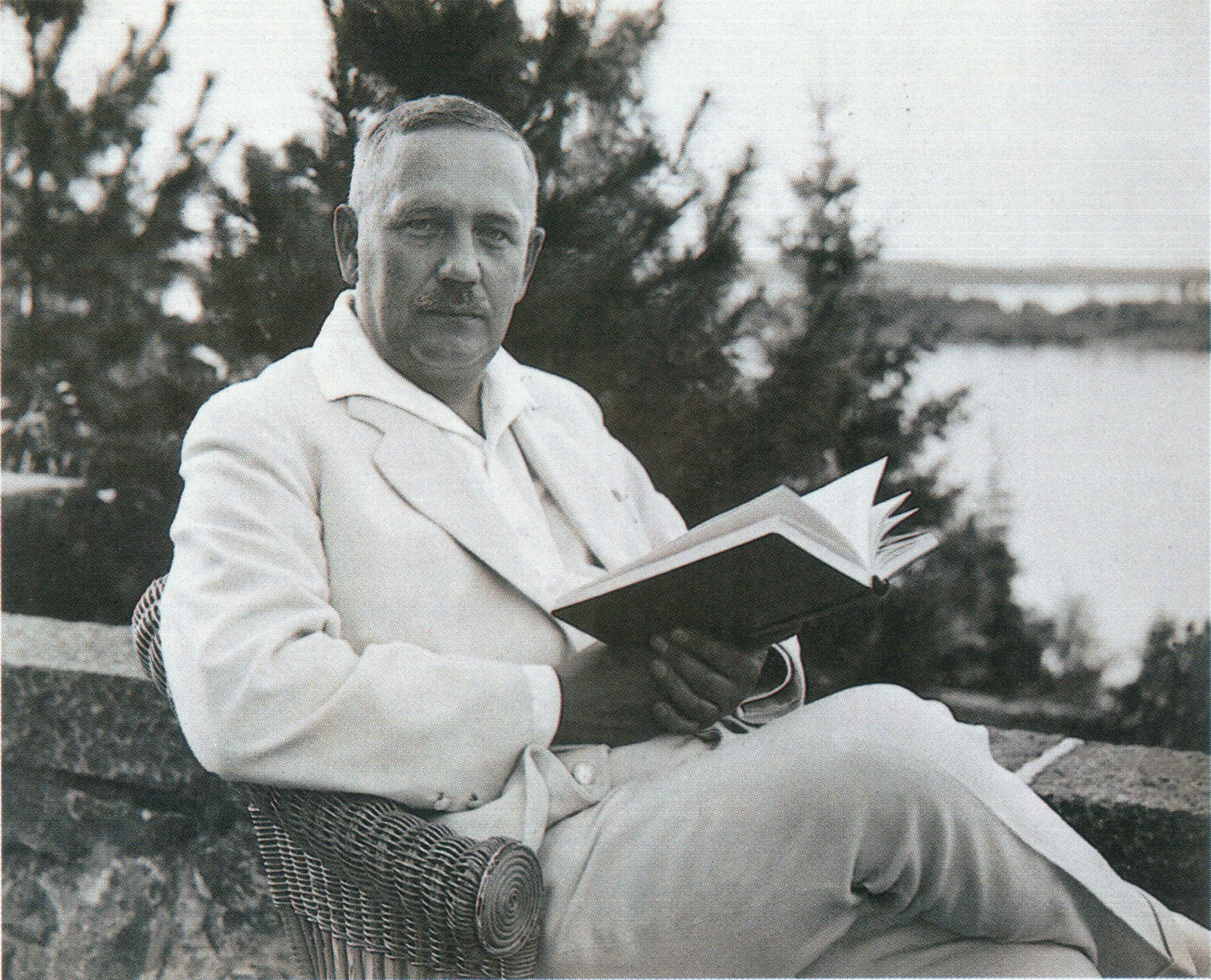 Presidentti Relander Kultarannan terassilla.